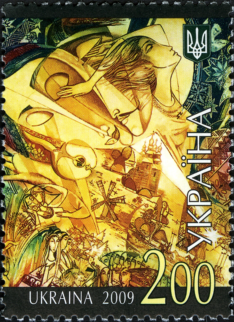 Поштова марка України "Пісні про кохання"